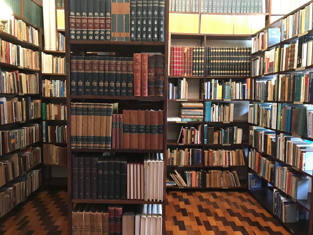 Vista parcial da Biblioteca Naval do CCMSC, localizada no segundo piso do Museu Naval, no Forte Santa Bárbara, em Florianópolis.